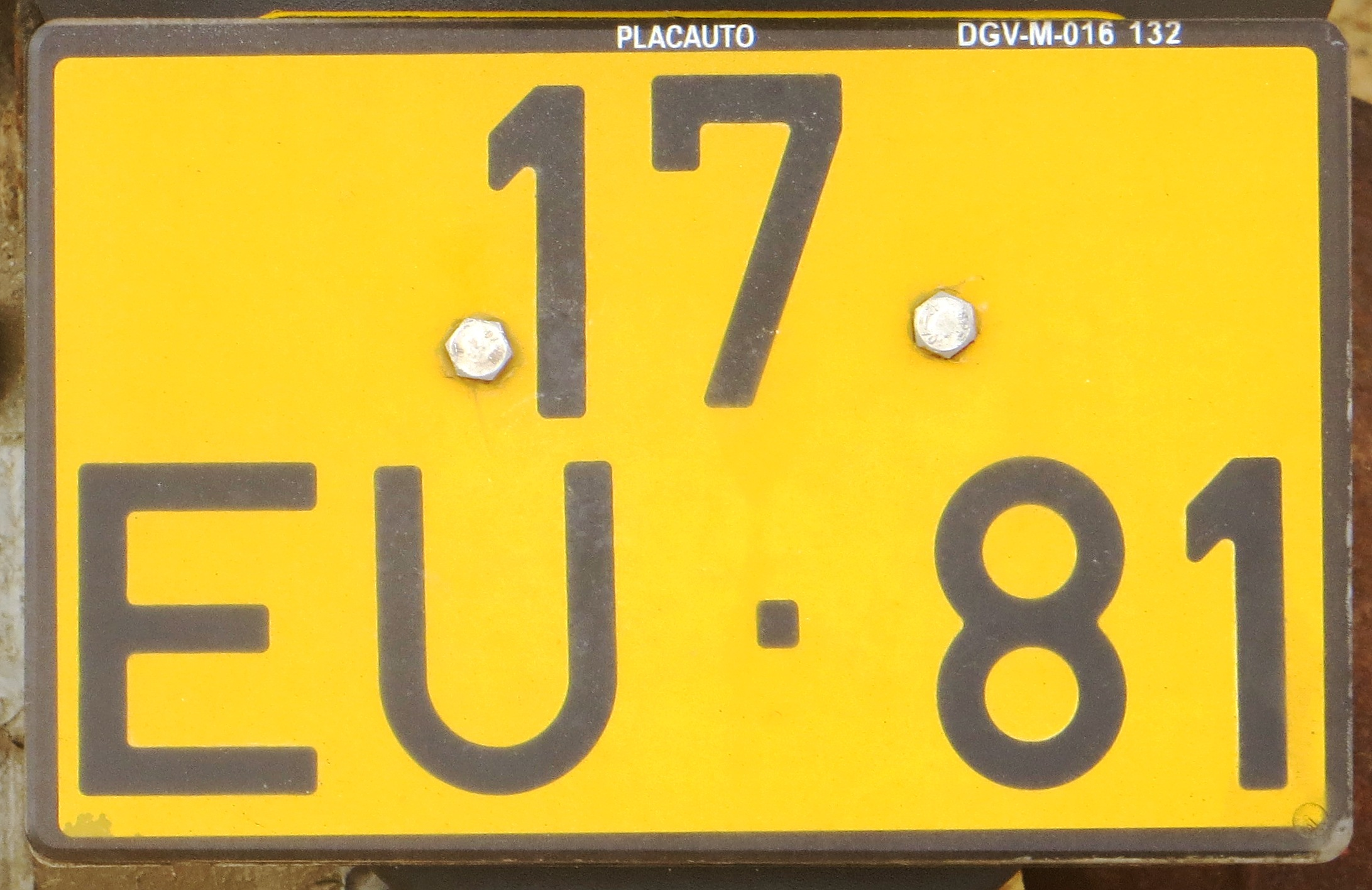 Bromfiets kentekenplaat Portugal